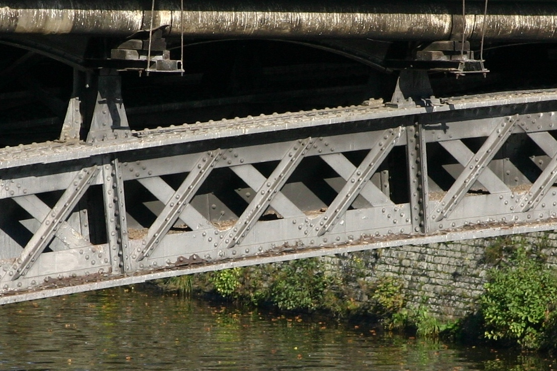 Pont de Fetinne Detail vun engem Träger.